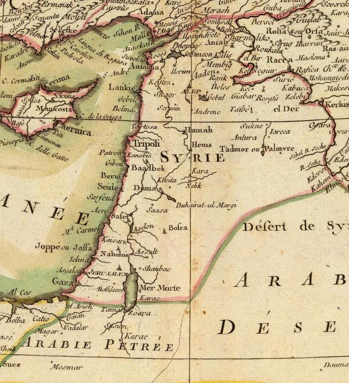 Carte de la Turquie d'Asie. Presque entiere contenant l'Anatolie, la Georgie, l'Armenie, le Curdistan, l'Alge-zira, l'Irak-Arabi, la Syrie &c. Projettee et assujettie aux observations celestes. Par M. Bonne, Hydrographe du Roi. A Paris, chez Lattre. Avec priv. du Roi. (1791)